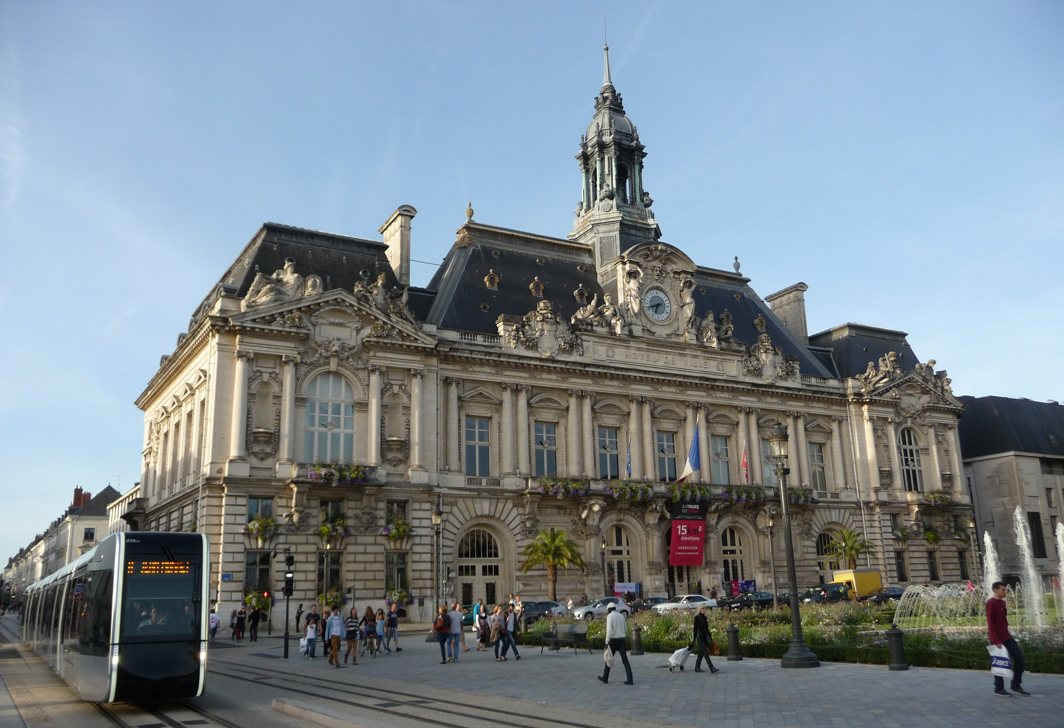 Hôtel de ville (Inscrit) et tramway. .